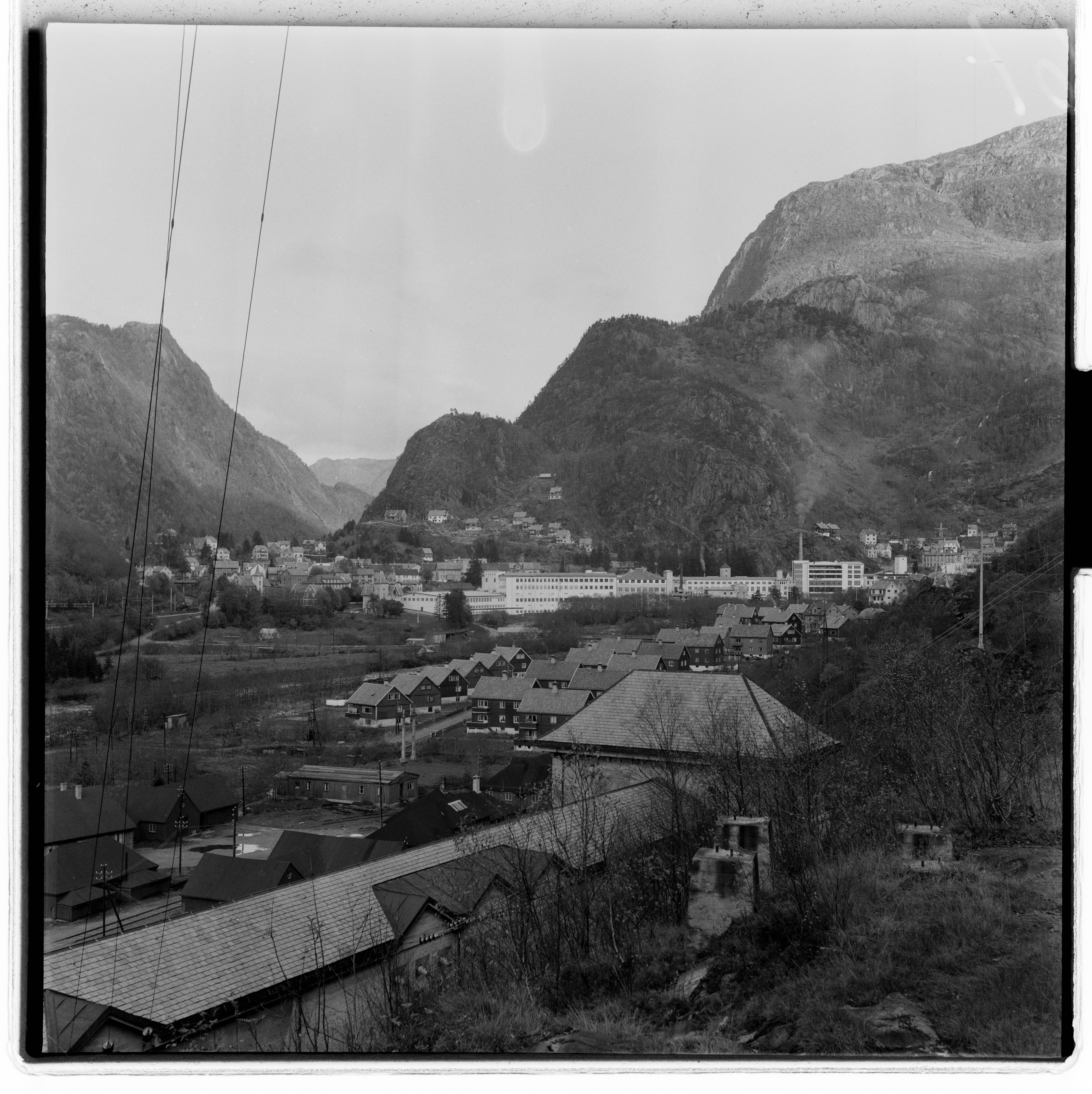 Bildet er hentet fra Arkivverket. Dale i Vaksdal. Foto tatt i forbindelse med reportasje om Dale fabrikker. NÅ nr. 25, 1953 Arkivinstitusjon : Riksarkivet Arkivnavn : Billedbladet NÅ Sted : Norge, Hordaland, Vaksdal, Dale Emneord: Næringsliv, Natur Avbildet